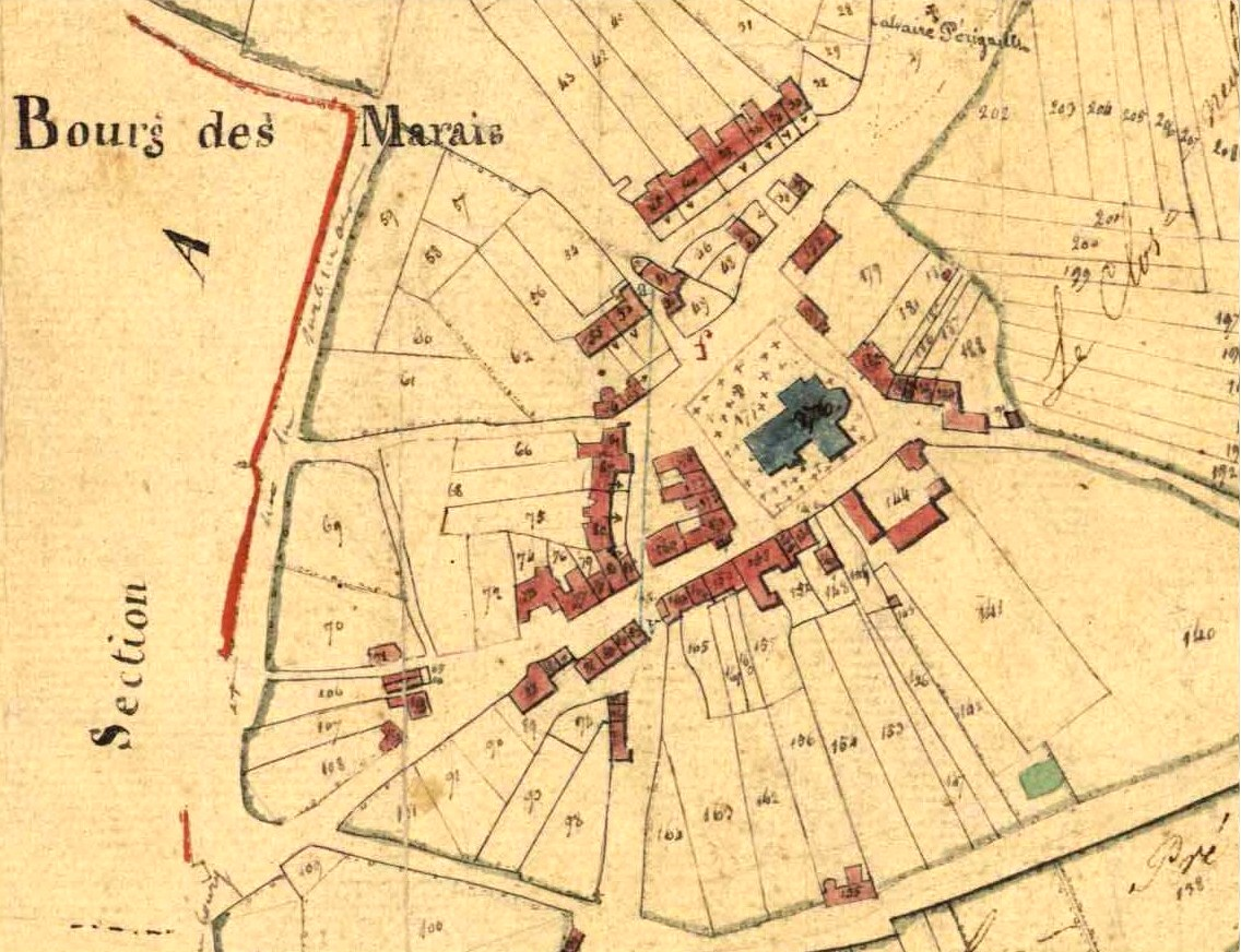 Plan cadastral du Bourg des marais en 1825